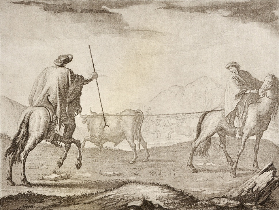 "Enlazando ganado en las pampas. Representa el modo de enlazar el ganado vacuno en los campos de Buenos Ayres"